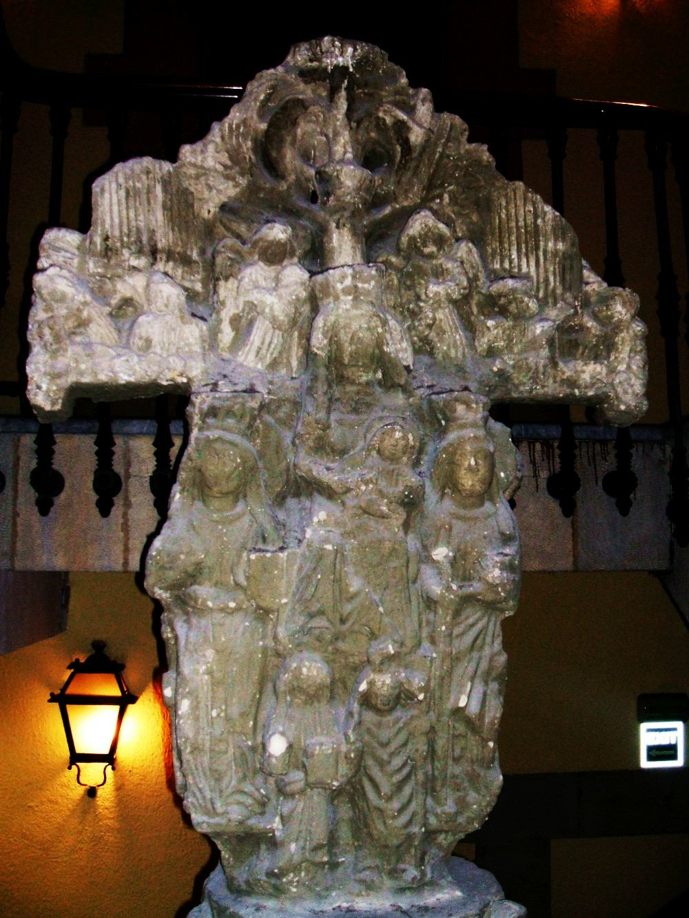 Reproducción del Crucero de Kurutziaga (Durango), en el Museo Vasco de Bilbao